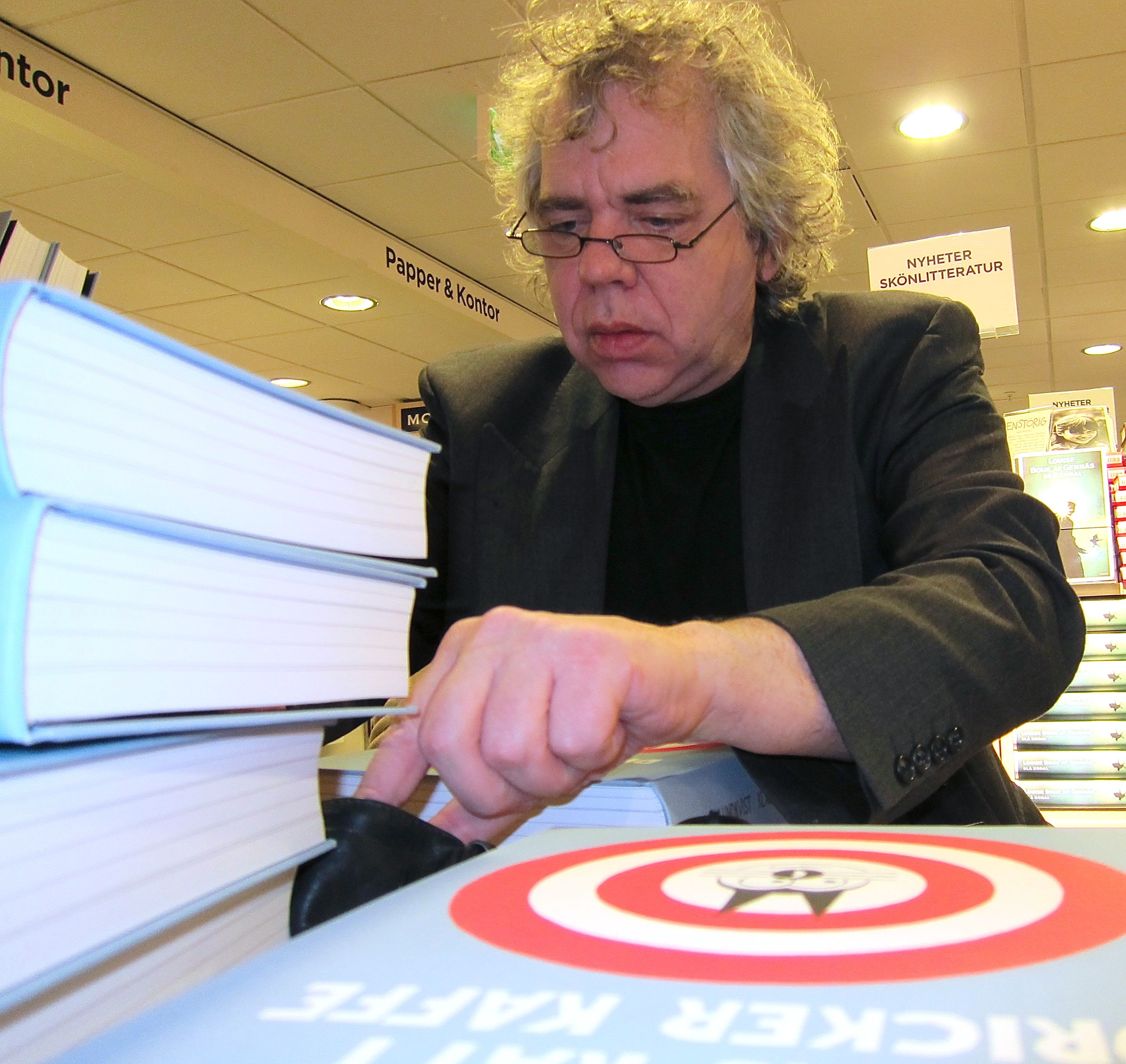 Gunnar Lundkvist signerar böcker på Akademibokhandeln City i Stockholm.